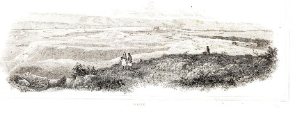 Plaine de Sparte (1831)